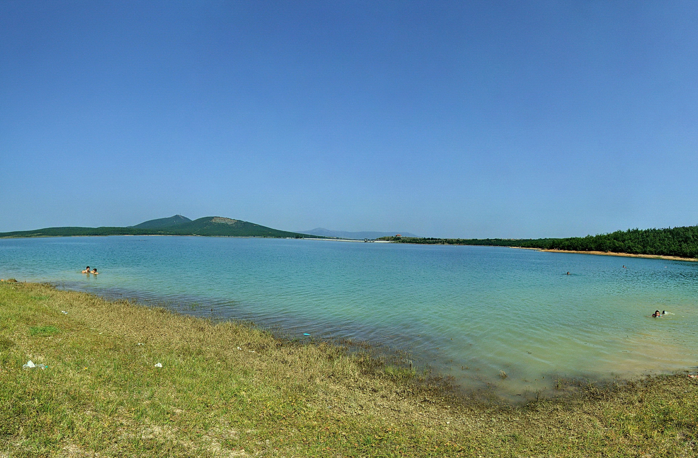 Panoramic photo of Radonjićko Lake, Serbia